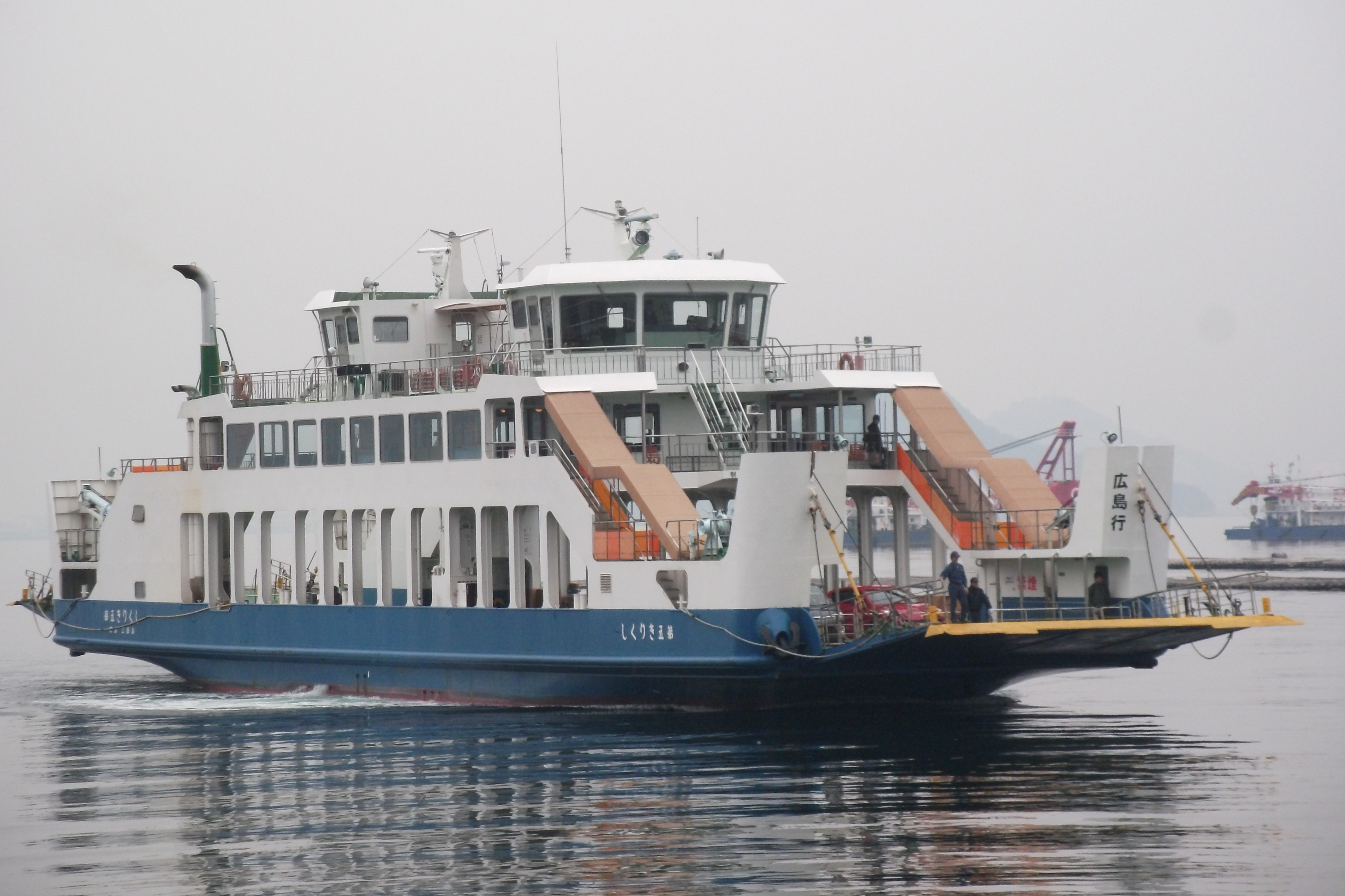 上村汽船 第五きりくし（広島県江田島市切串港）